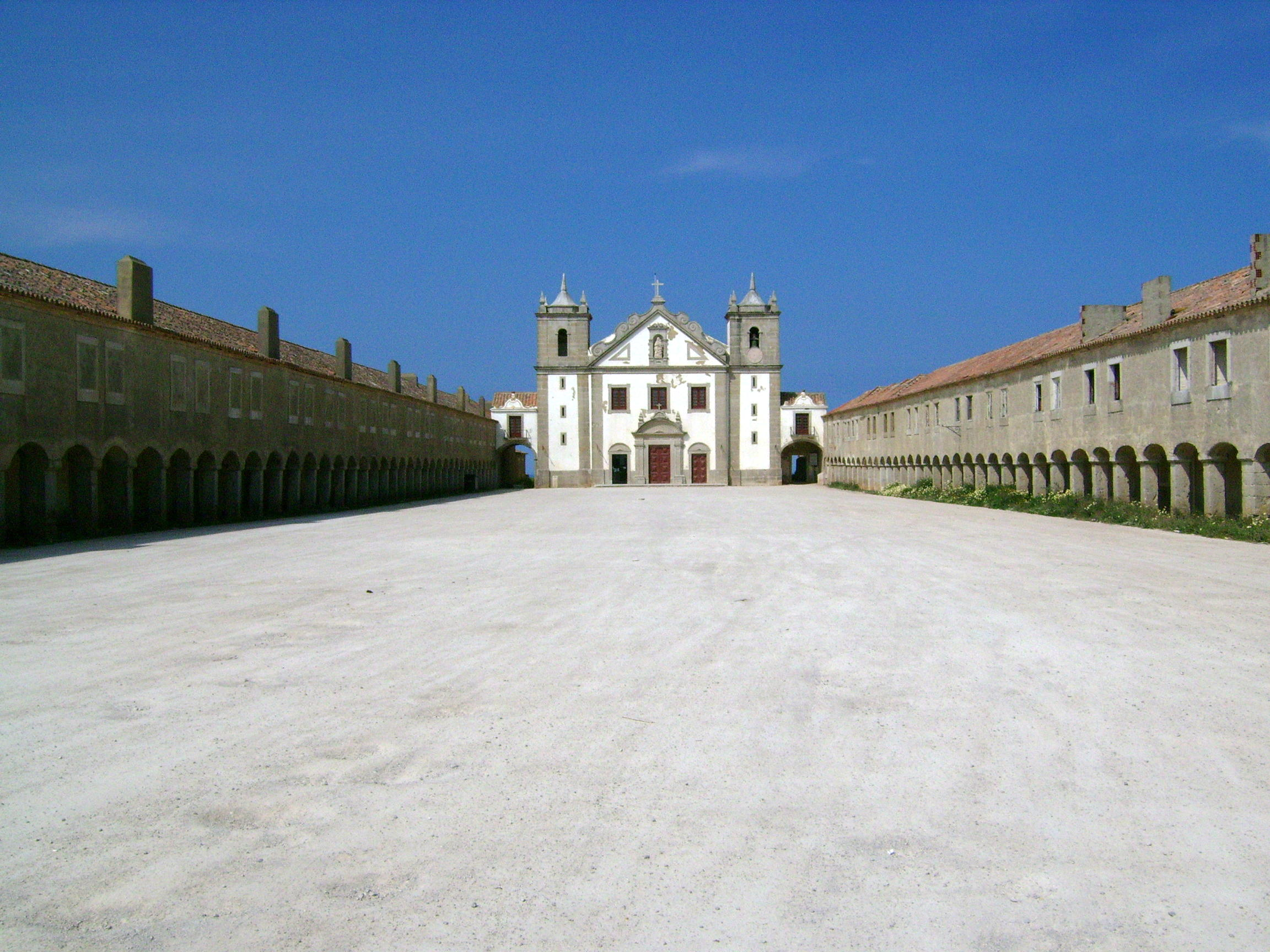 Terreiro Local : Santuário de Nossa Senhora da Pedra Mua Local - Cabo Espichel / Sesimbra / Portugal user:sacavem (pt) (usuário:sacavem)